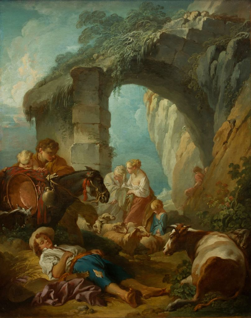 Сельская жизнь. Приписывается Франсуа Буше. Собрание Смоленской художественной галереи